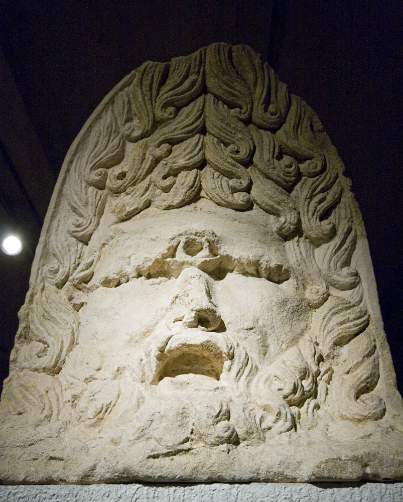 Masque de Cyclope, trouvé au quartier des Massues, entre 1808 et 1809. Calcaire, H 94cm, L 84cm, épaisseur 35 cm. datation fin Ier ou début IIe siècle; Musée Gallo-Romain de Fourvière, inventaire 2001-0-344; Carte Archéologique de la Gaule 69/2 Lyon, 2007, p 700